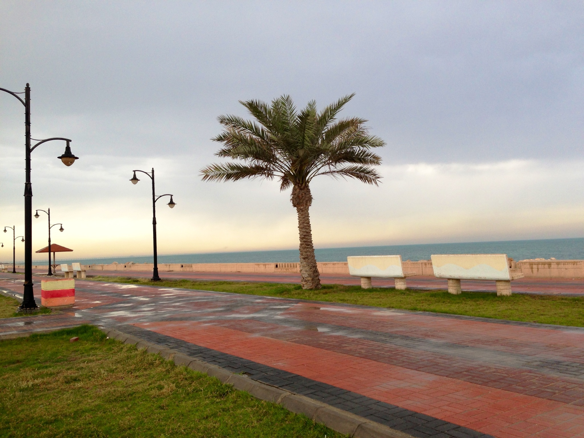 شاطئ مدينة راس تنورة ، في المنطقة الشرقية ، المملكة العربية السعودية .